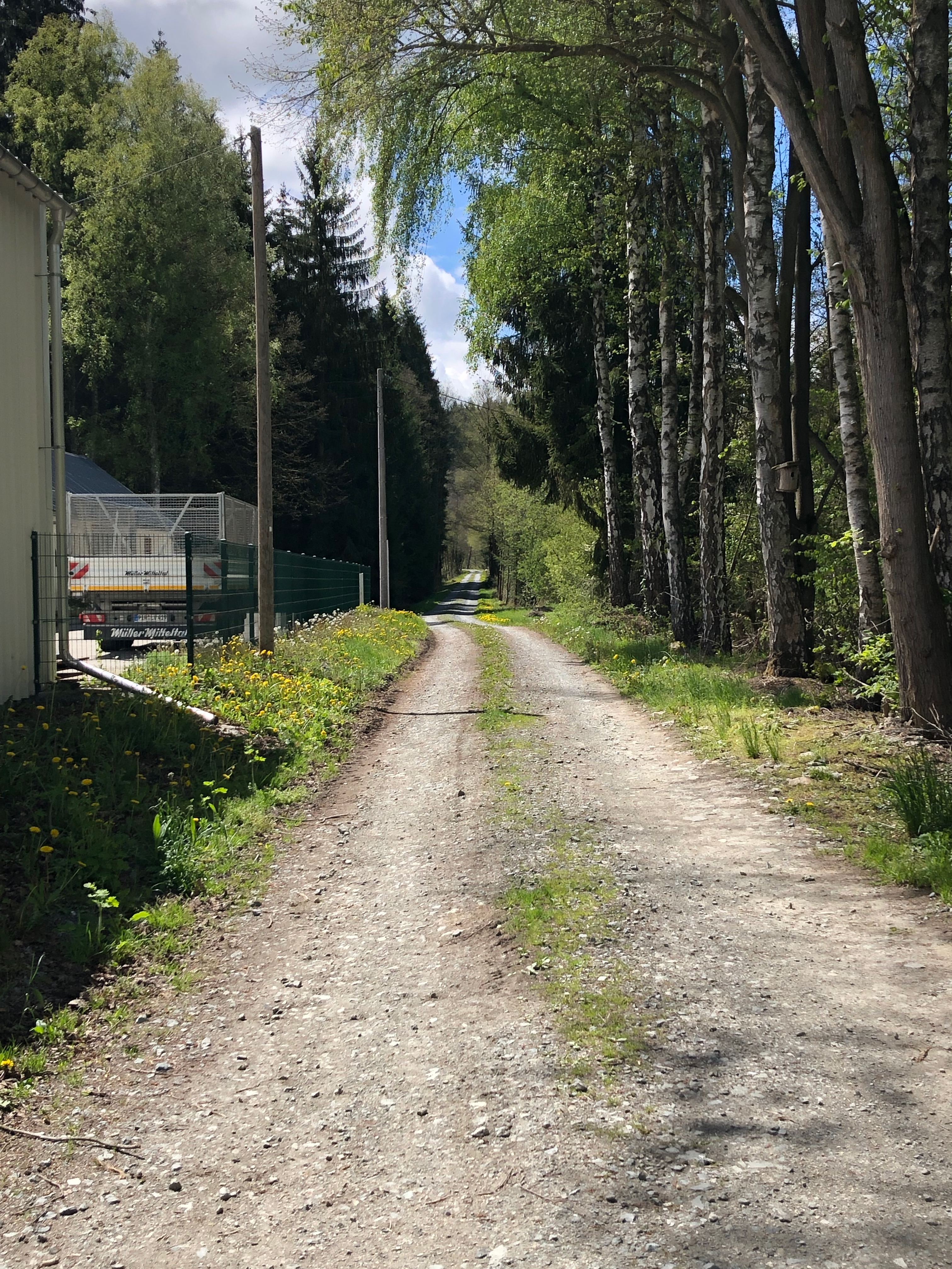 Haltepunkt Leubetha (2019)